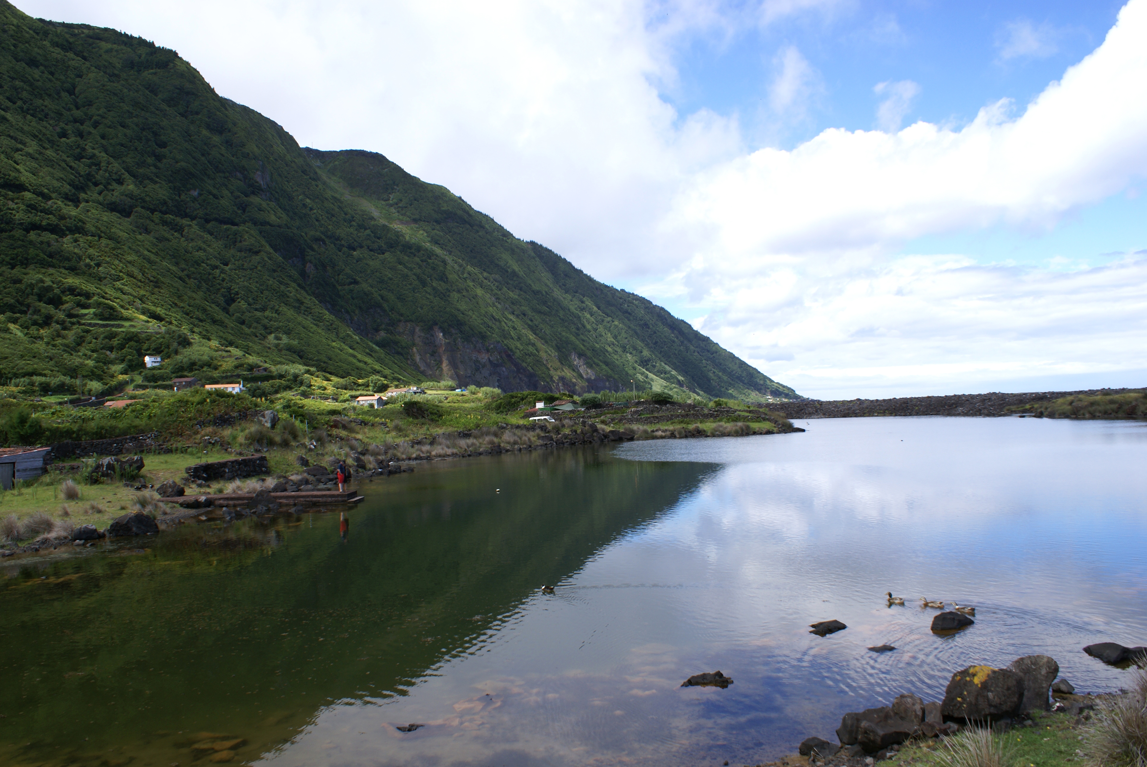 Lagoa da Fajã dos Cubres e um cais, Calheta, ilha de São Jorge, Açores